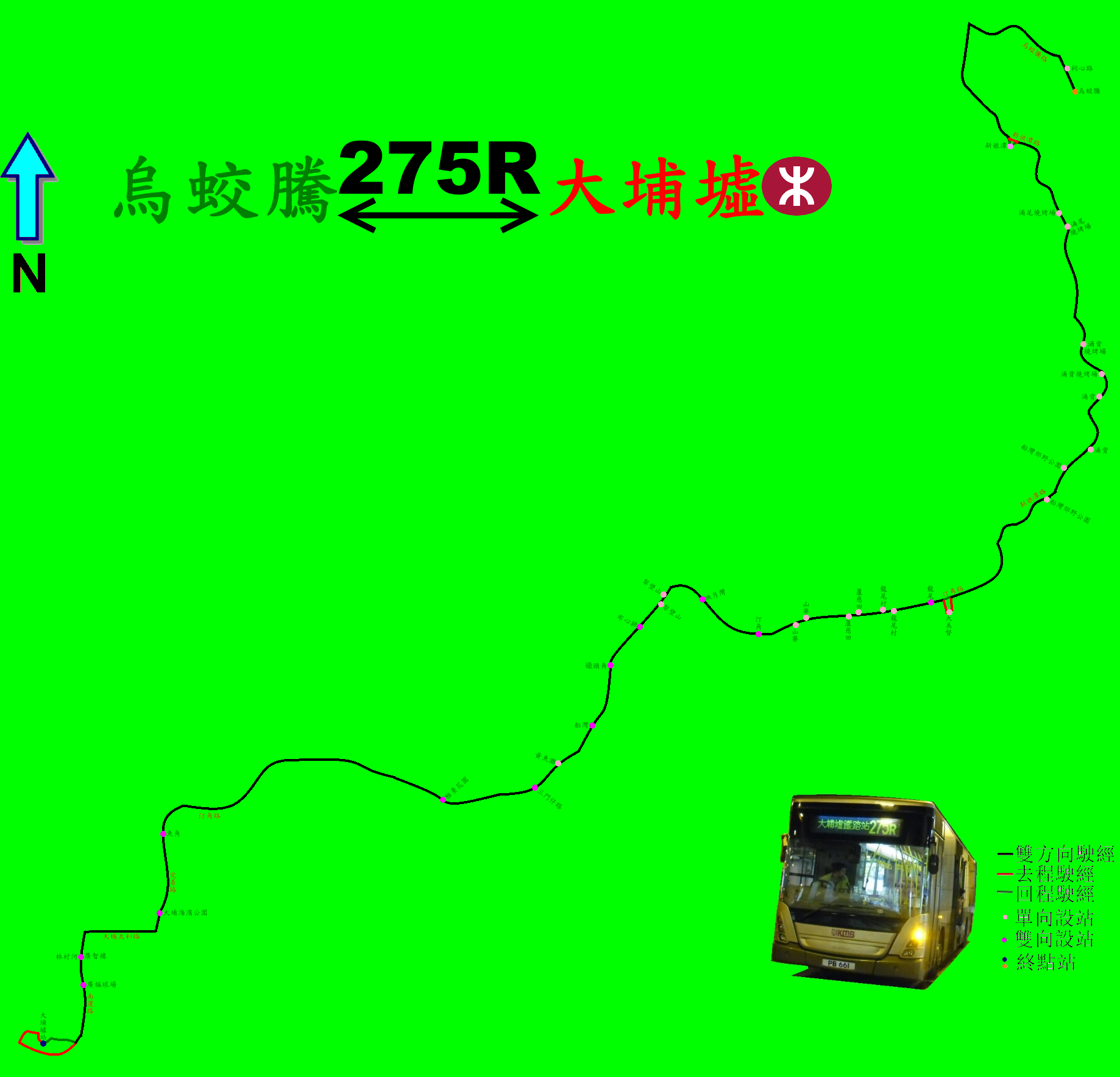 中文（香港）: 九巴275R線的走線圖